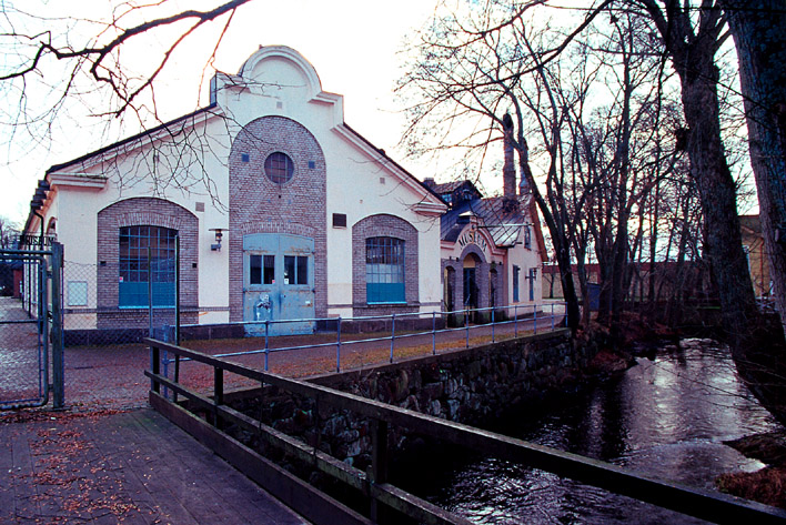 Die Insel Vulcanön in Tidaholm, Schweden.